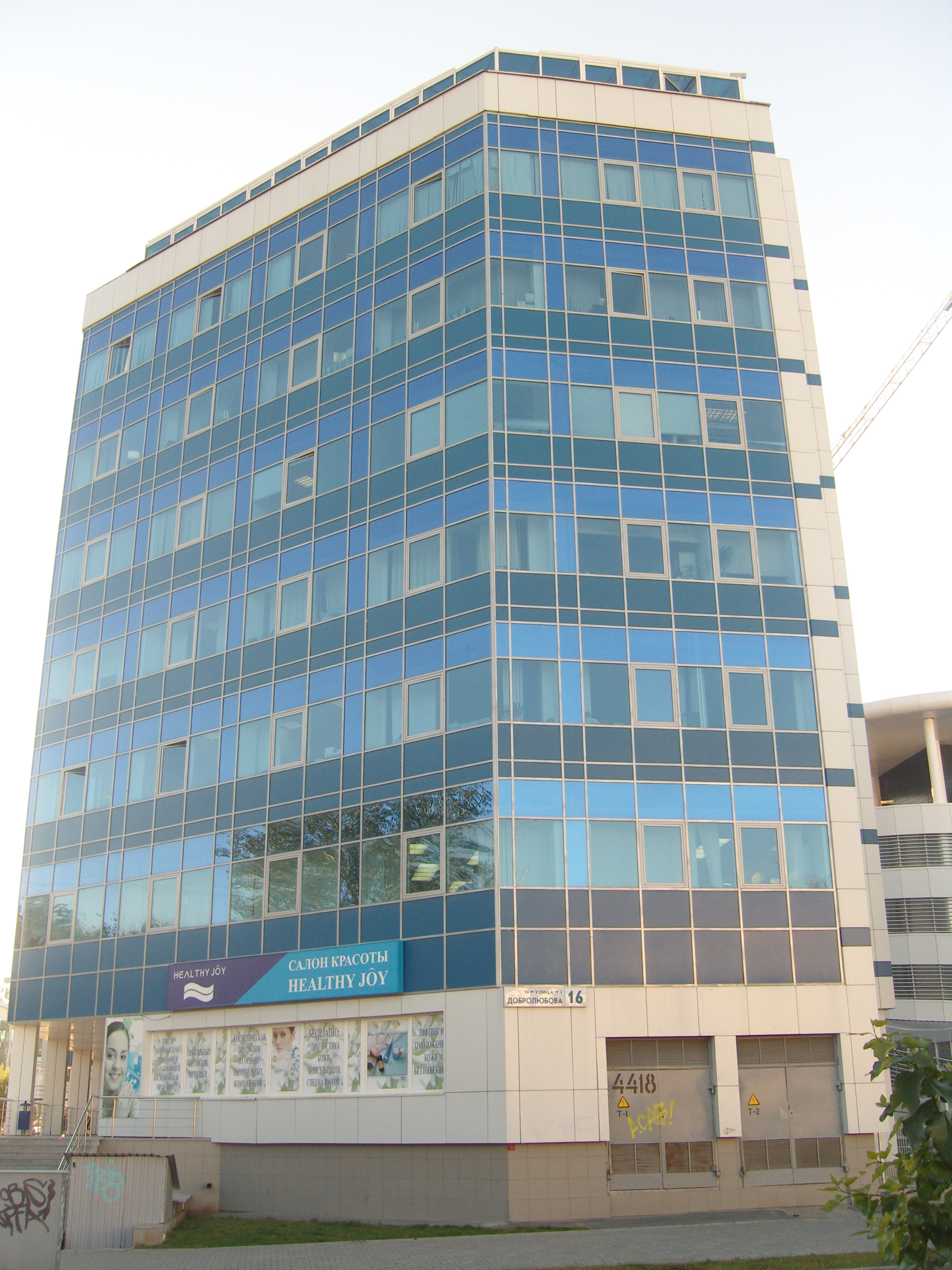 Улица Добролюбова, 16